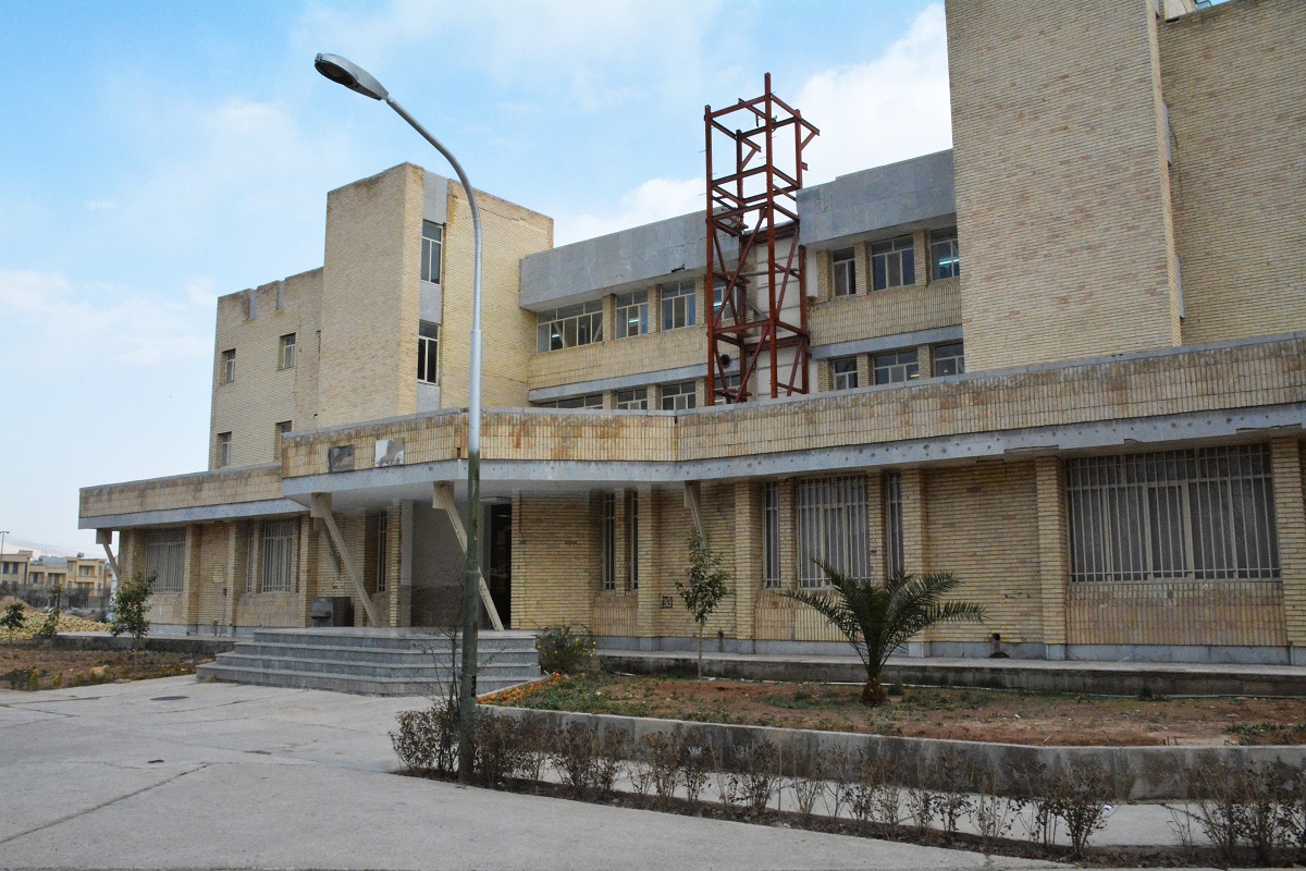 دانشکده مهندسی مکانیک و عمران و محیط زیست دانشگاه صنعتی شیراز